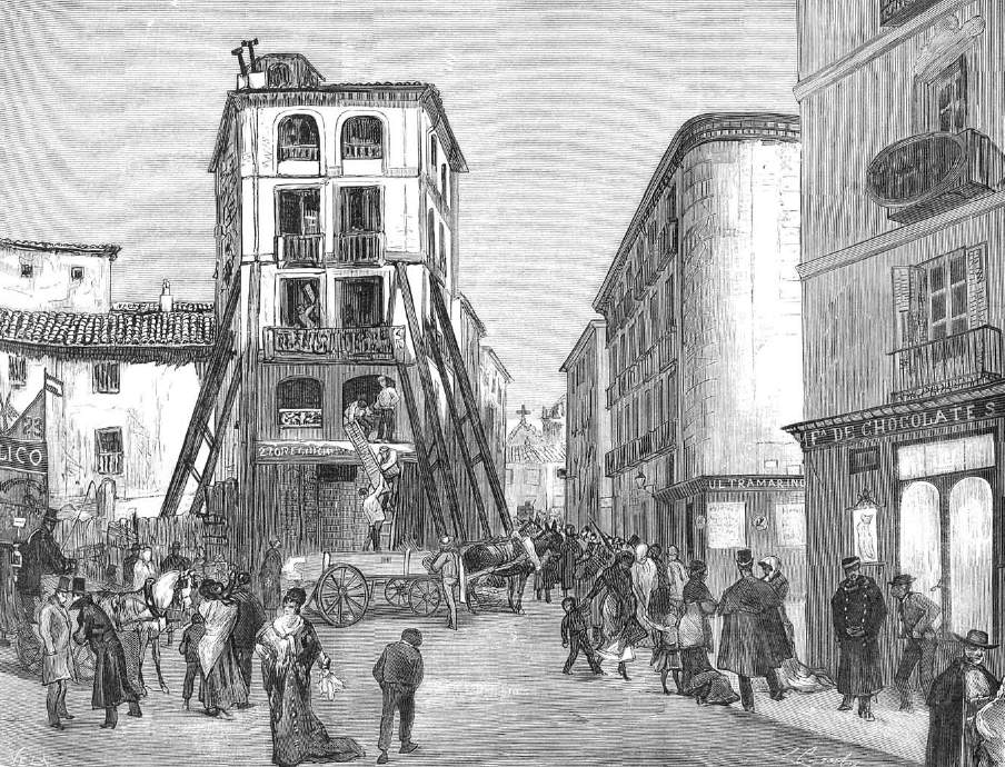 Grabado 'Derribo de la casa del núm. 1 de la calle Sevilla, Madrid, con motivo del ensanche proyectado'. La Ilustración Europea y Americana, 15 de marzo de 1879, página 1.